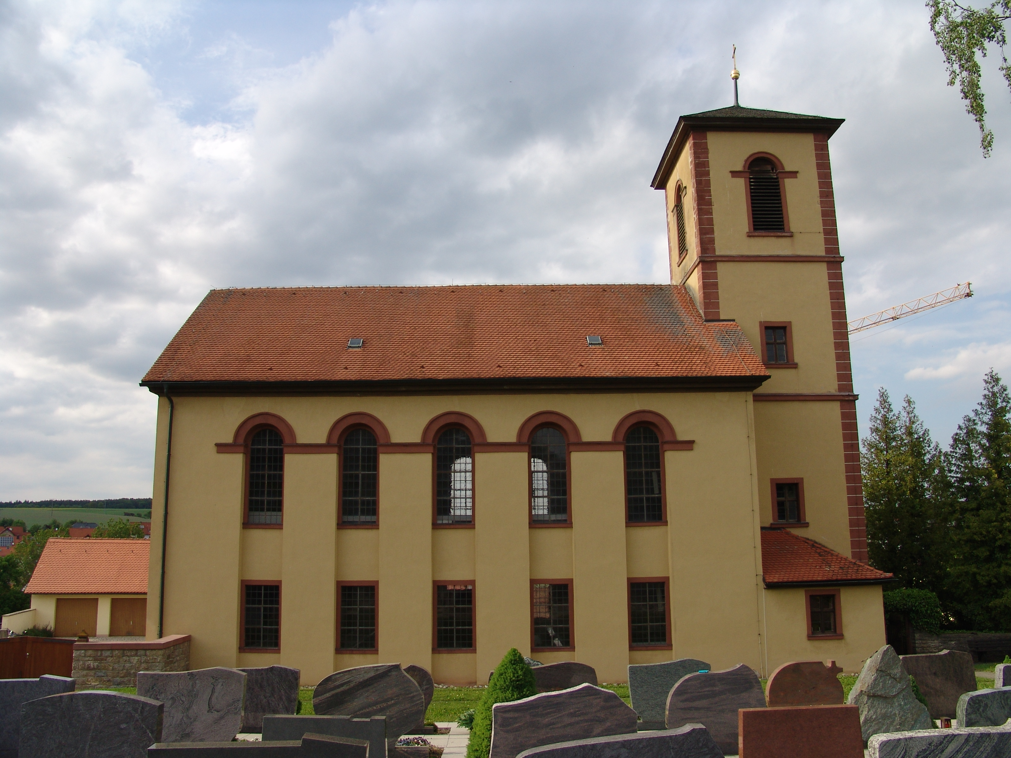 evang.-luth. Kirche in Oberaltertheim